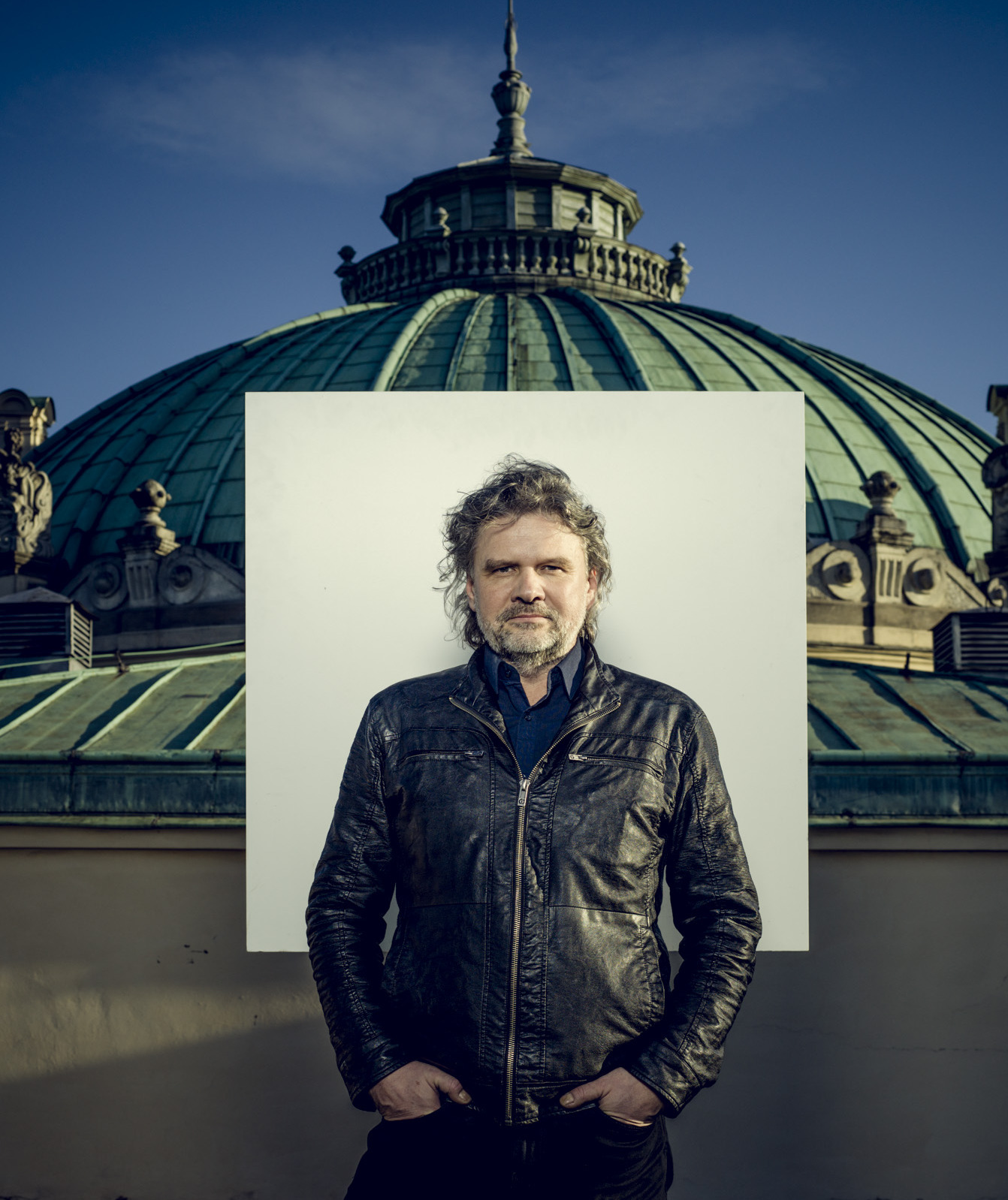 Krzysztof Głuchowski, aktor